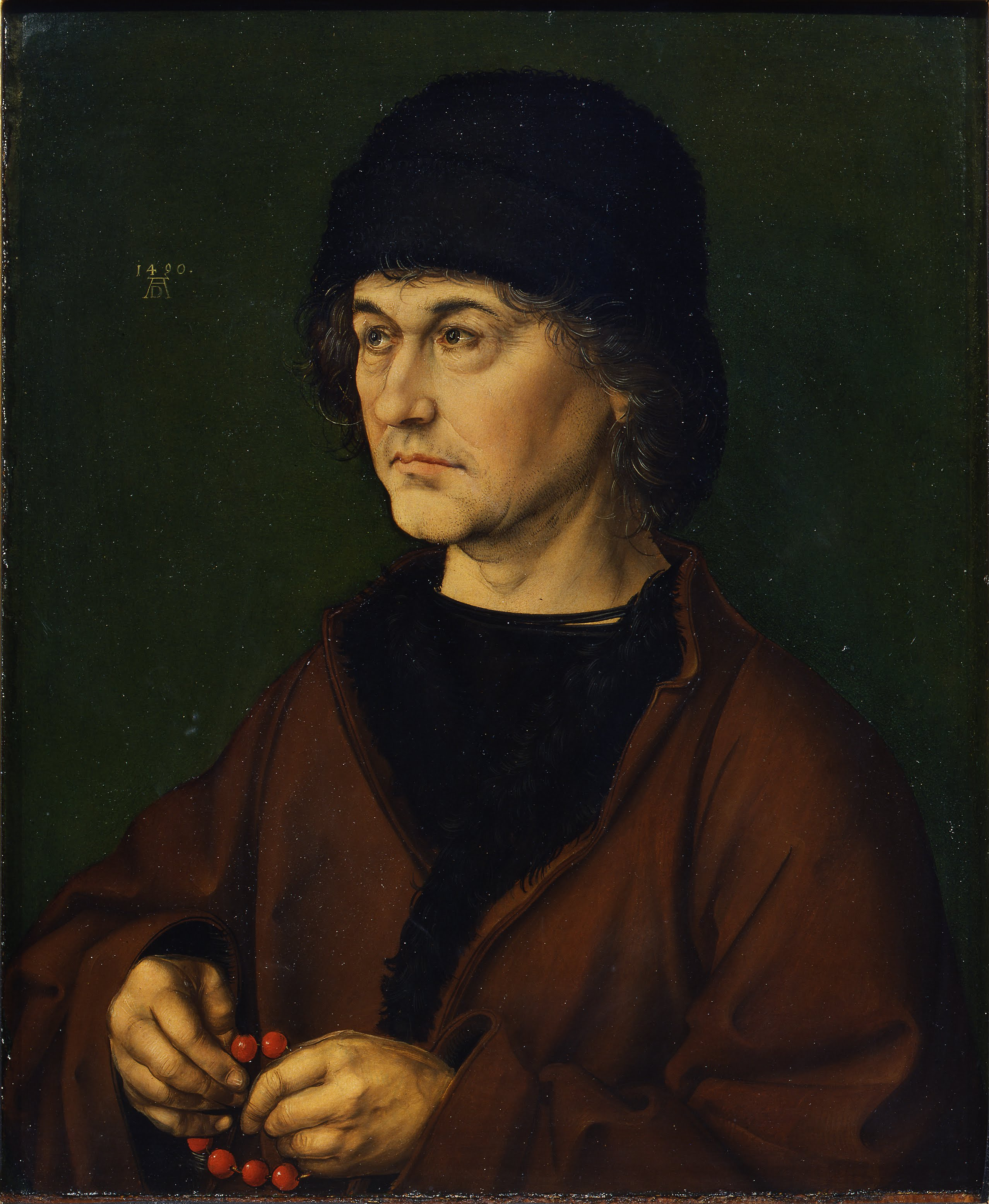 nach links gewandtes Brustbildnis von Dürers Vater, Albrecht Dürer d.Ä., vor grünem Hintergrund, mit braunem Mantel, schwarzer Mütze und einem Rosenkranz in den Händen; auf der Rückseite Allianzwappen von Albrecht Dürer d.Ä. und seiner Ehefrau Barbara Holger, zwischen dem Wappen und der Jahrzahl 1490 ist schwach die mit den Inventaren der Sammlung des Willibald Imhoff 1573, 1580 und 1588 übereinstimmende Zahl „19“ zu erkennen.